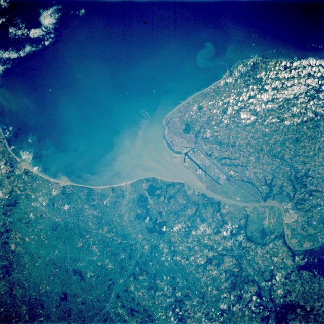 Le Havre en omgeving - monding van de Seine.